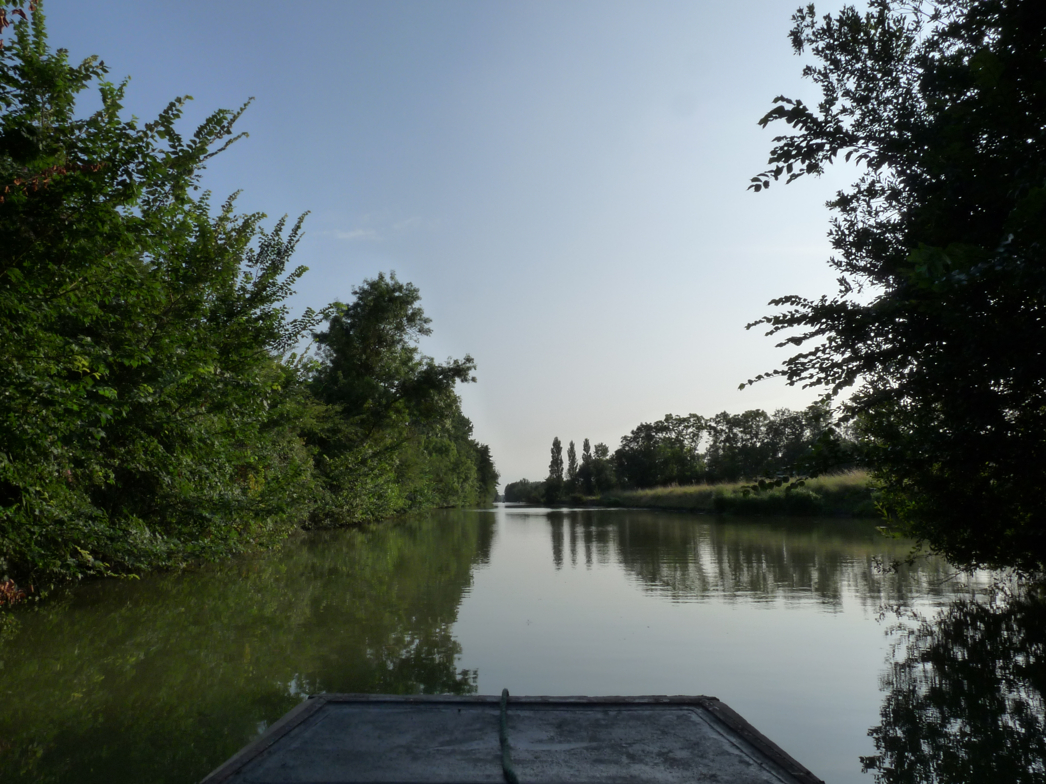 De Maillezais (Vendée, France) vers l'aqueduc, canal de la Jeune Autize.